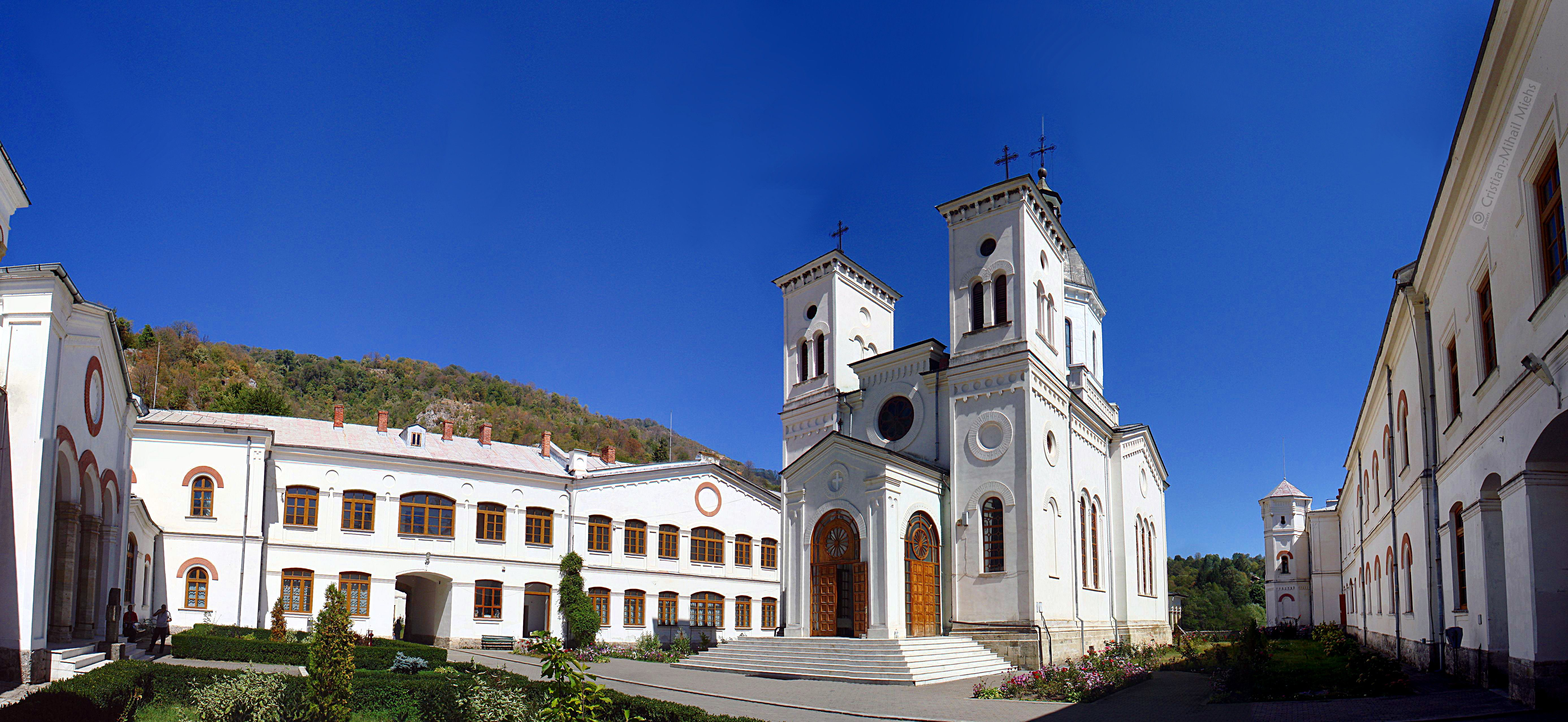 Vedere de ansamblu a curţii Mănăstirii Bistriţa din judeţul Vâlcea